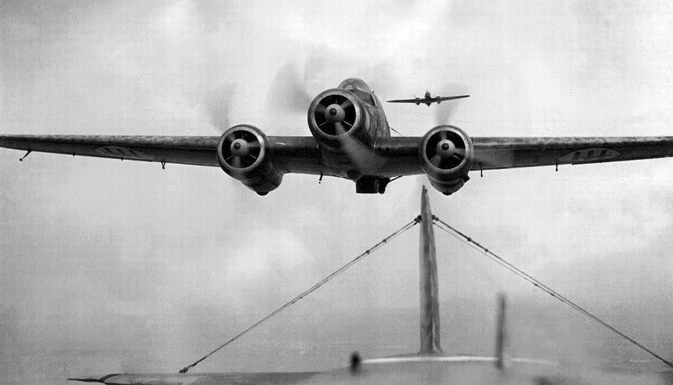 Aereo Savoia Marchetti SM 79 Sparviero in volo Savoia-Marchetti SM.79